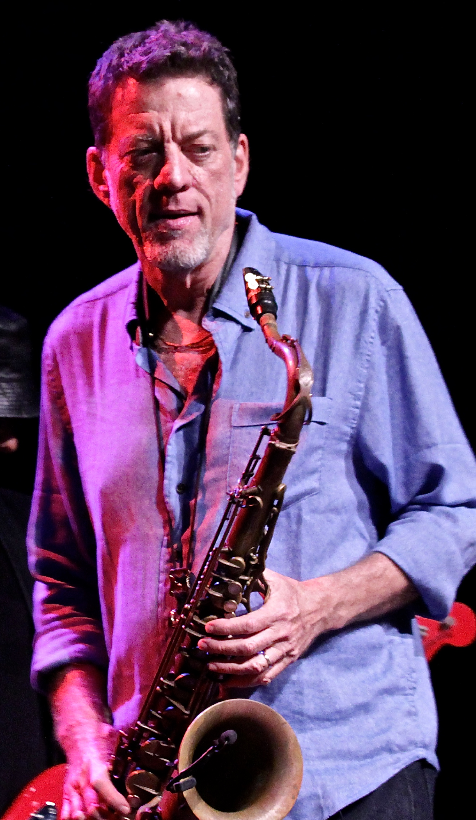 Crédito: Babi Furtado